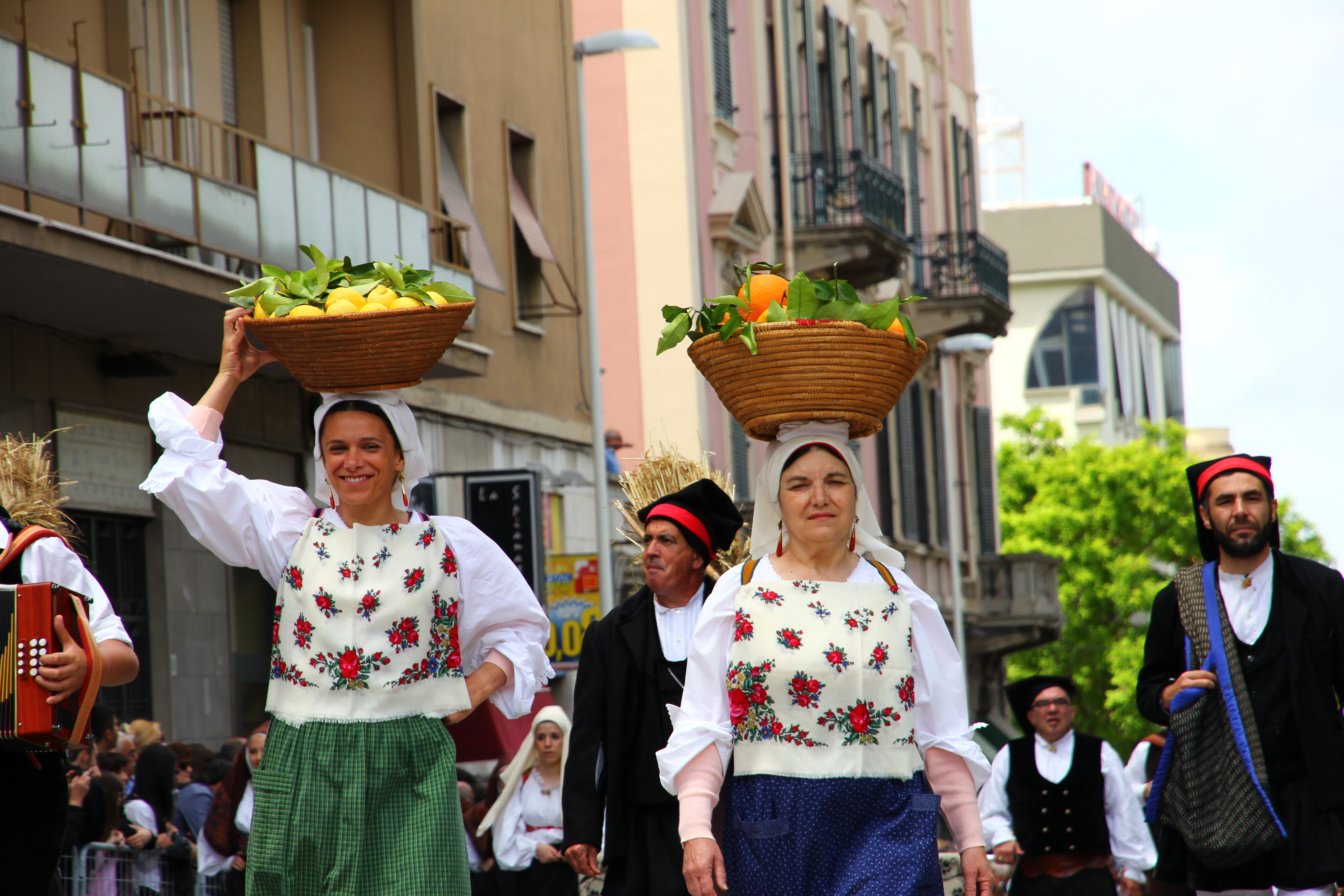 Cavalcata Sarda 2013 (Sassari)